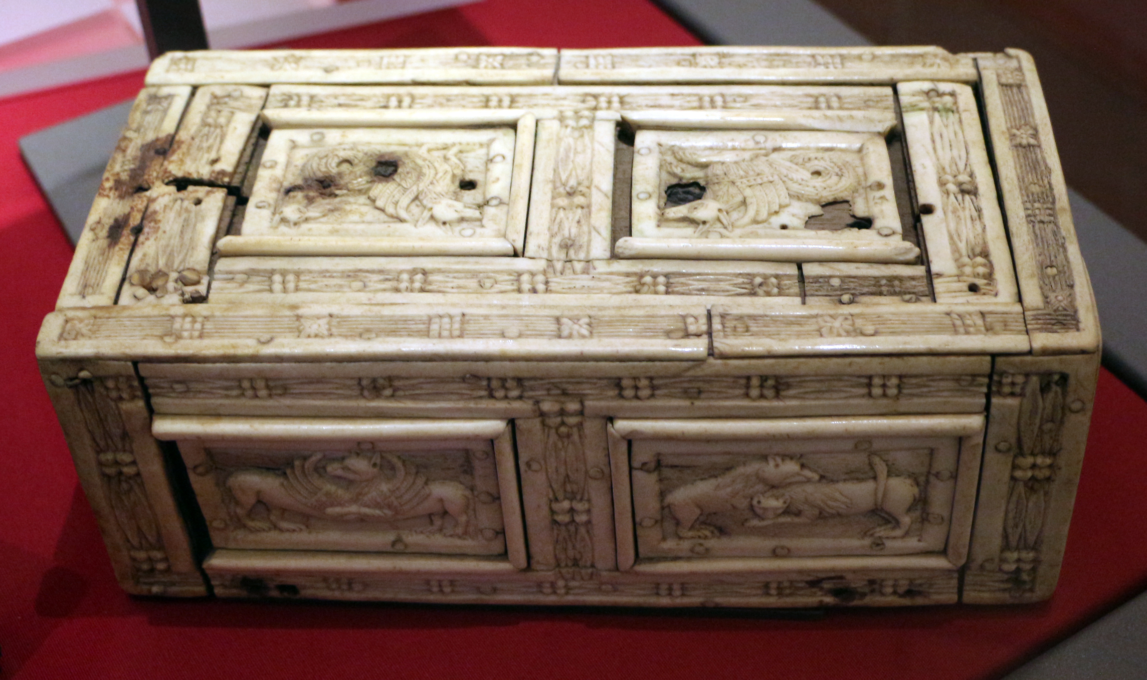 Museo nazionale di Ravenna This is a photo of a monument which is part of cultural heritage of Italy.